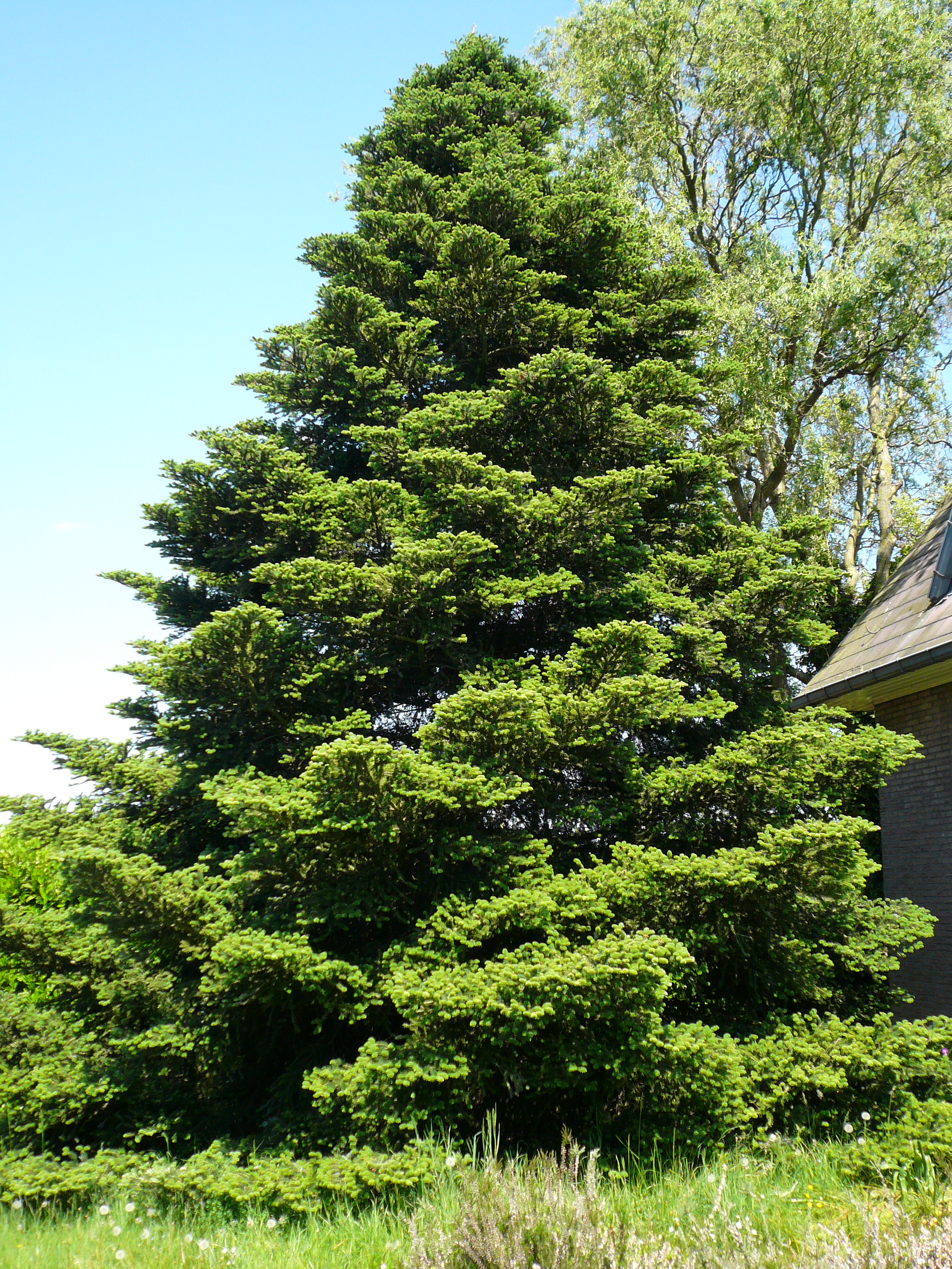 Abies koreana - Photo personnelle prise dans mon jardin